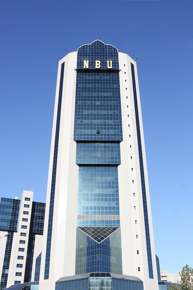 National Bank for Foreign Economic Activity of Uzbekistan